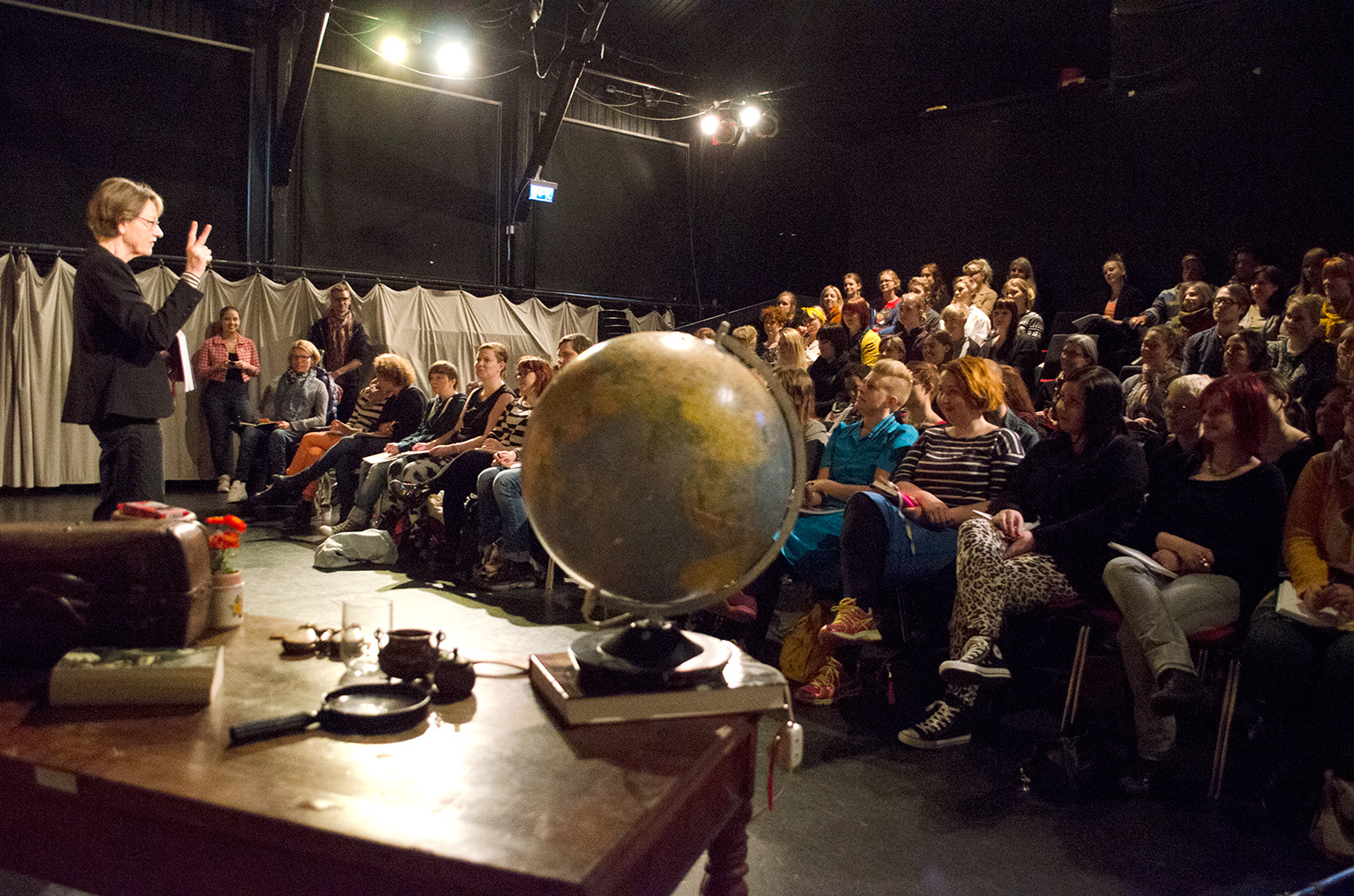 Gudrun Schyman på Homeparty berättar om varför feminismen är så viktig i det politiska landskapet.